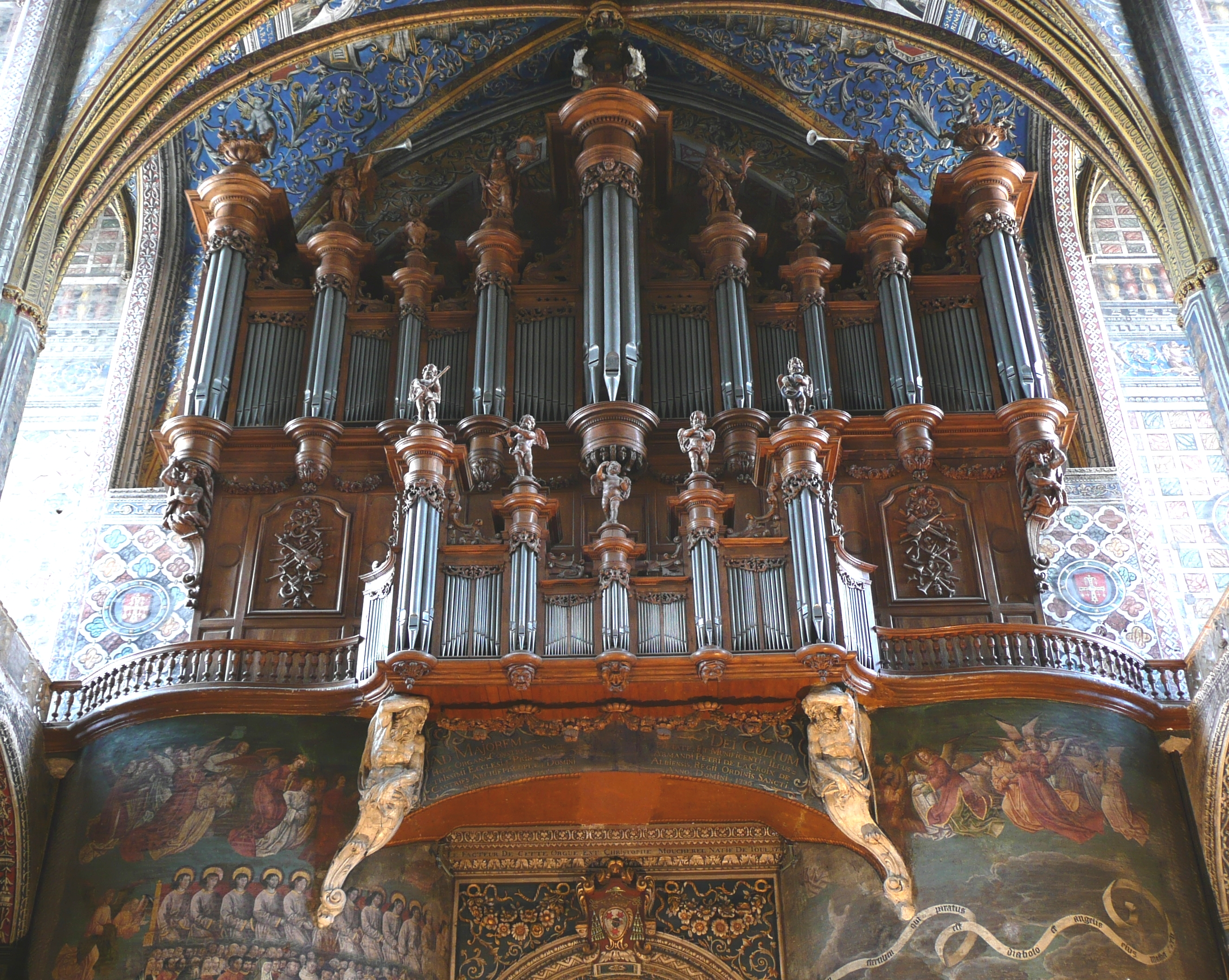 Mis au"goût du jour" durant la période romantique, en piteux état dans les années cinquante,sa restauration est décidée et confiée en 1977 à Bartoloméo Formentelli qui est chargé de restituer la situation de 1825. Le même effectuera un grand relevage en 1996.